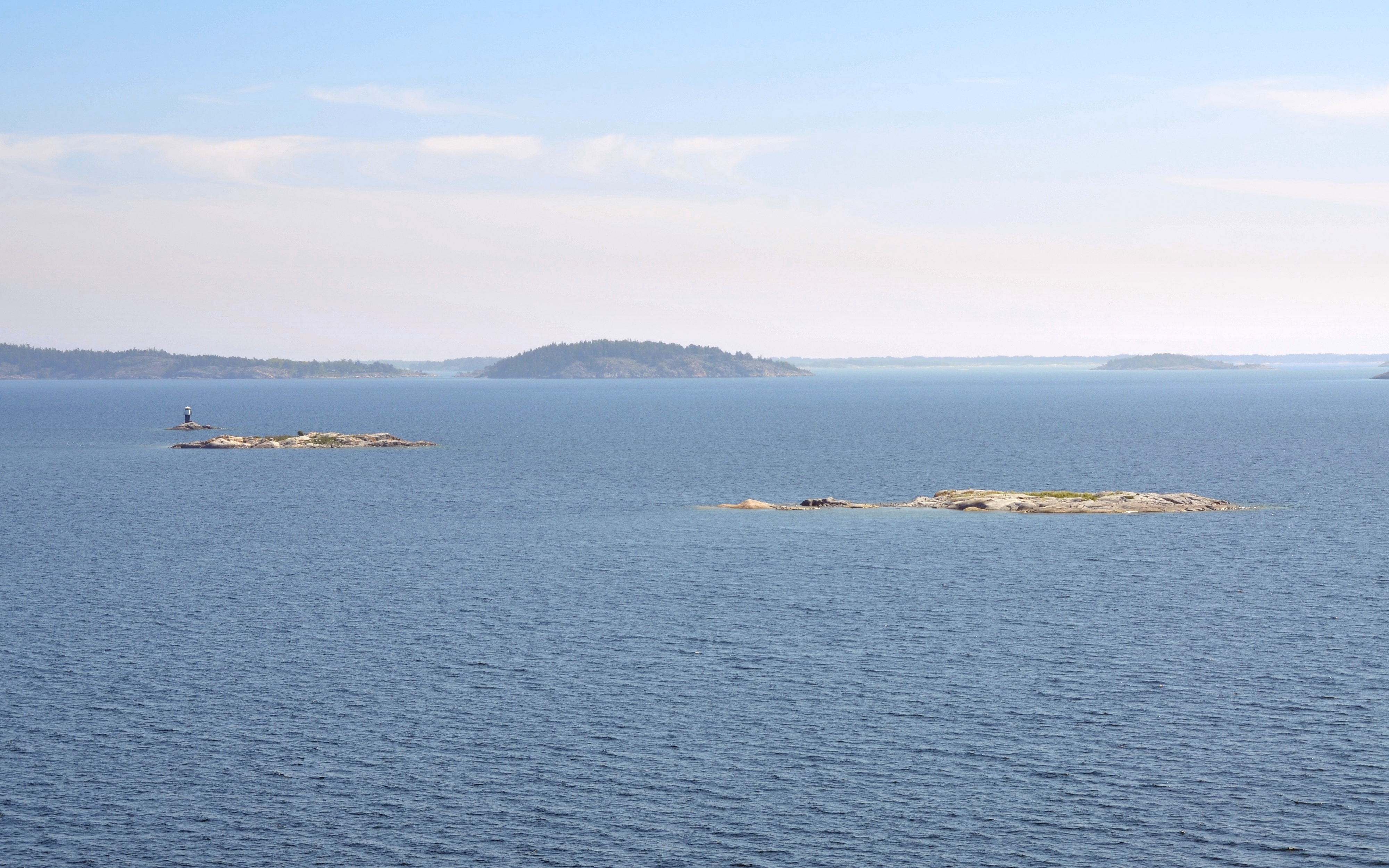 Havsgjusorna är tre skär mitt i Jungfrufjärden mellan Dalarö och Nämdö. På den bortersta av dem står fyren Fjärdhällan.